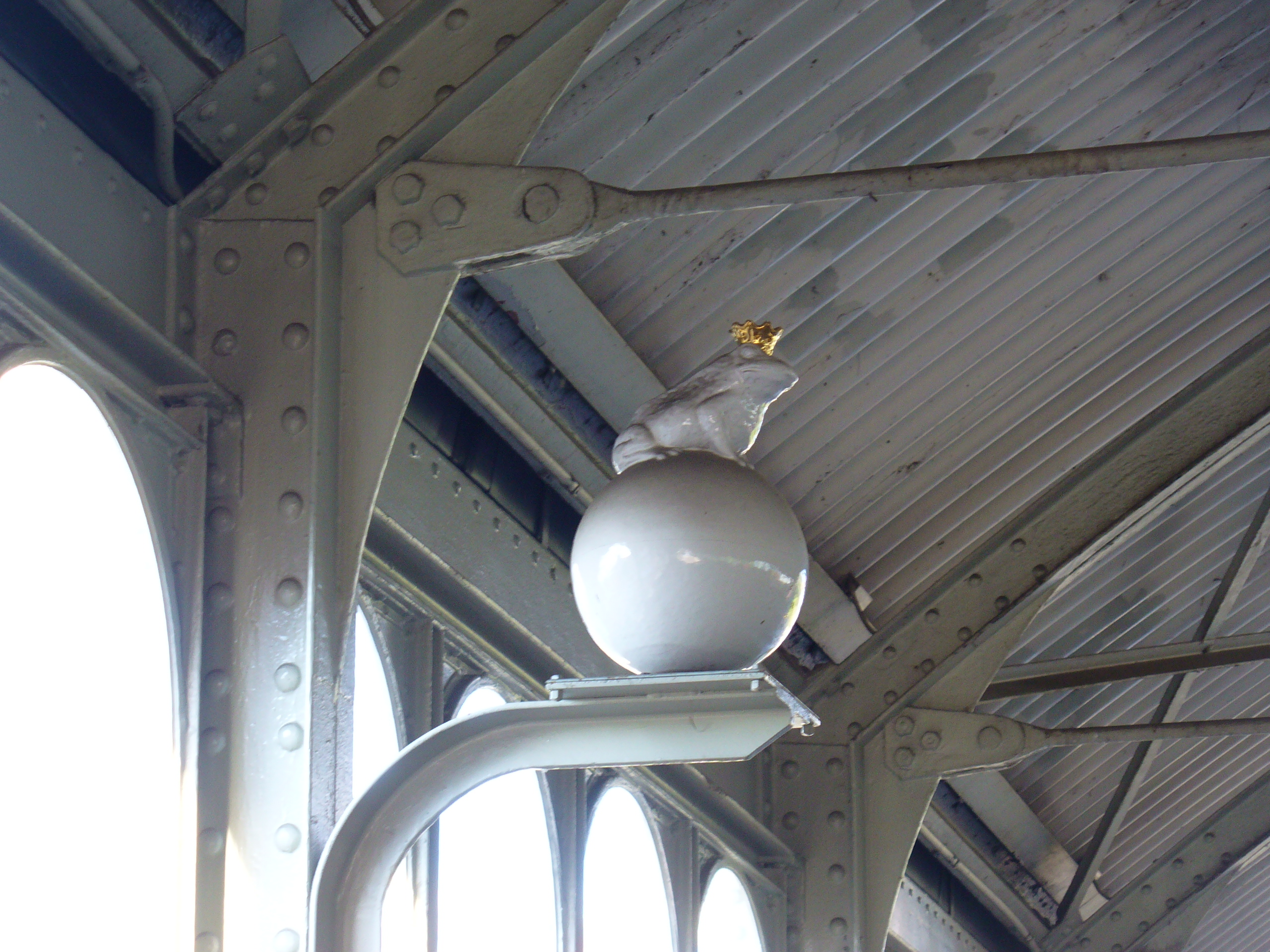 U-Bahn Berlin U1 Prinzenstrasse, Froschskulptur seitlich